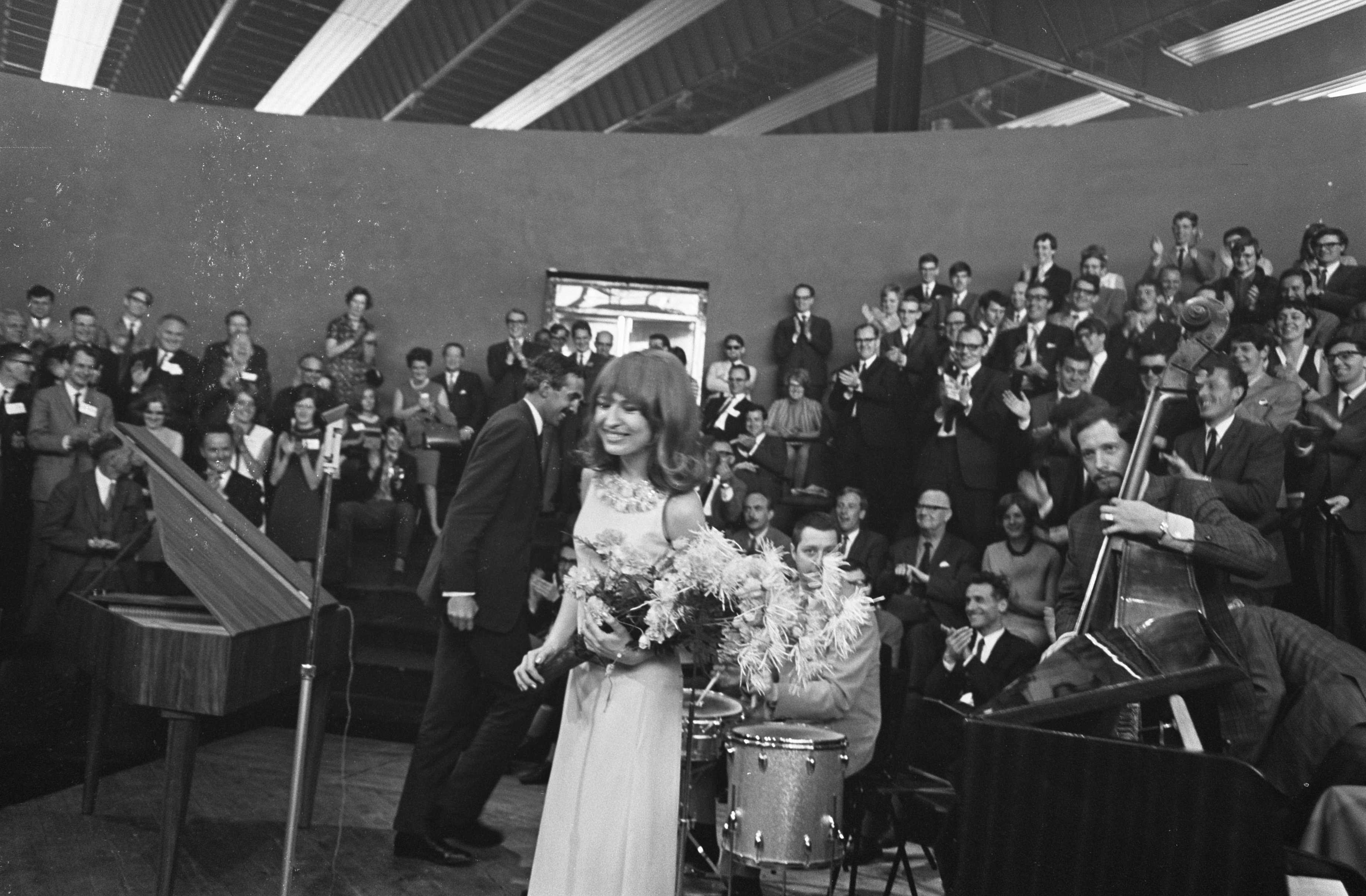 Collectie / Archief : Fotocollectie Anefo Reportage / Serie : [ onbekend ] Beschrijving : Radicalen PRR vergaderen in Dronten. Liesbeth List op congres Datum : 27 april 1968 Locatie : Dronten Trefwoorden : congressen, radicalen, vergaderingen Persoonsnaam : List, Liesbeth Fotograaf : Kroon, Ron / Anefo Auteursrechthebbende : Nationaal Archief Materiaalsoort : Negatief (zwart/wit) Nummer archiefinventaris : bekijk toegang 2.24.01.05 Bestanddeelnummer : 921-2920 Reacties Geplaatst door Maaike op 19 januari 2014 - 14:51. Politieke Partij Radicalen (PPR) Persoonsnamen: Politieke Partij Radicalen (PPR) Plaats: Dronten, Oostelijk Flevoland Trefwoorden: politieke partijen